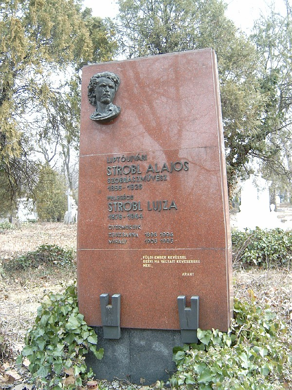 Stróbl Alajos (Liptóújvár, 1856. jún. 21. – Bp., 1926. dec. 13.): szobrász sírja Budapesten. Kerepesi temető: 26/1-1-35 [szobrász: Stróbl Alajos].